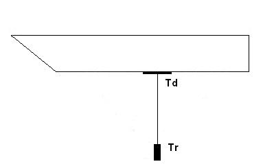 Principe van een USBL systeem